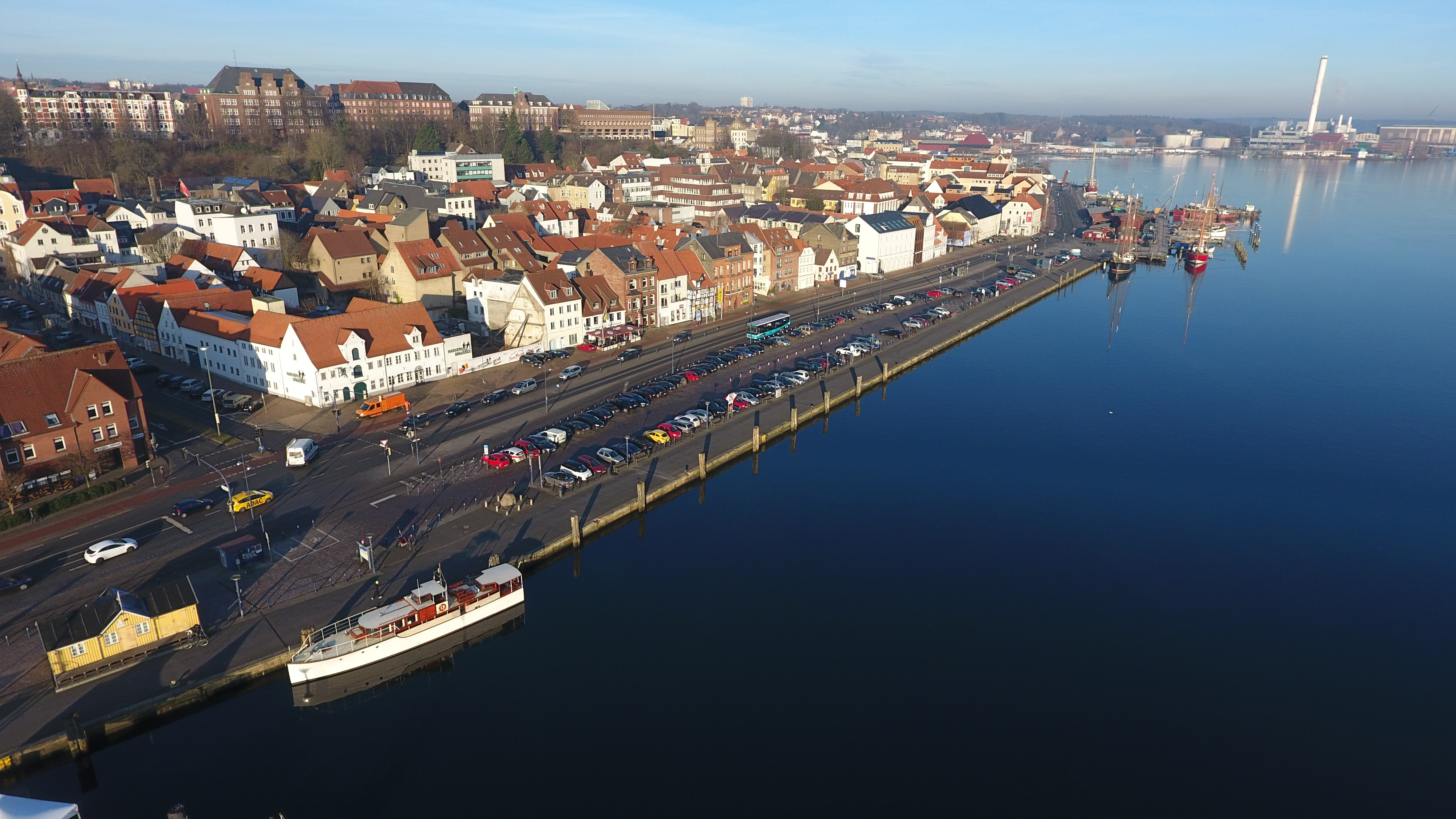 Seitlicher Blick aus Richtung Hafenspitze auf die Parkplaetze an der Flensburger Schiffbruecke.